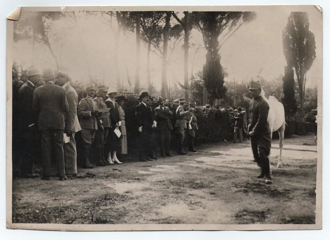 La Principessa Iolanda visita i puledri della razza di Persano, nel concorso ippico di Roma, Maggio 1922.